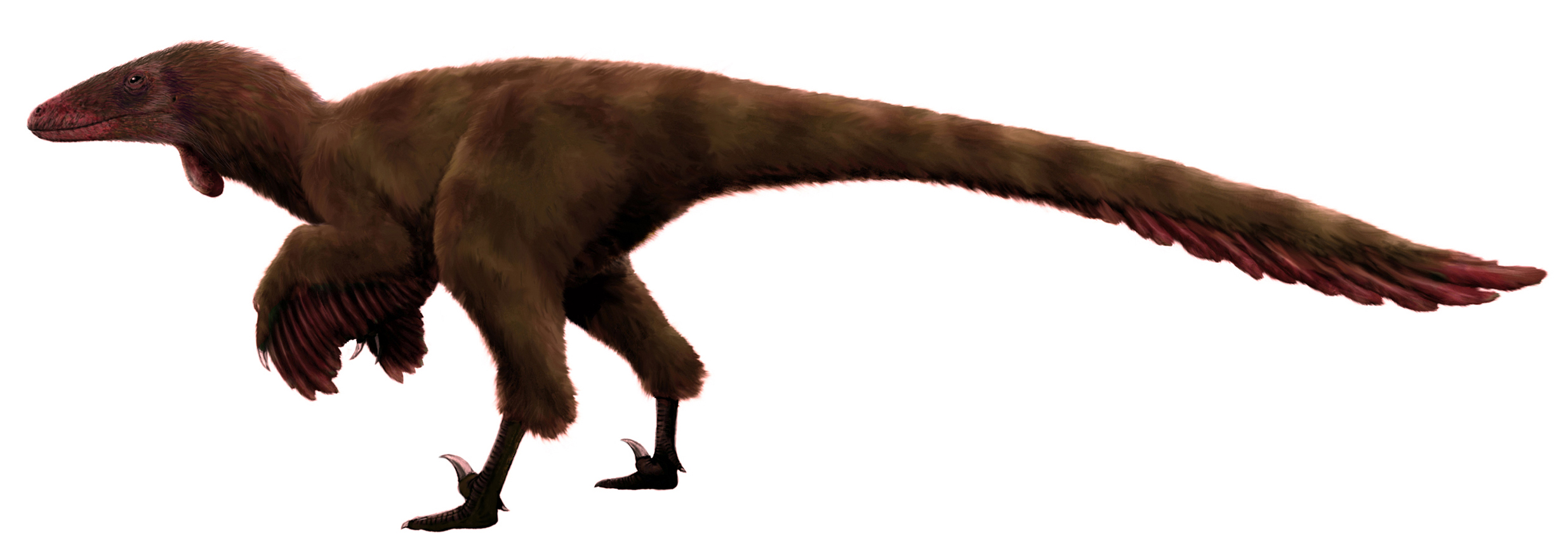 Yurgovuchia doellingi (originally drawn as generic dromaeosaur).